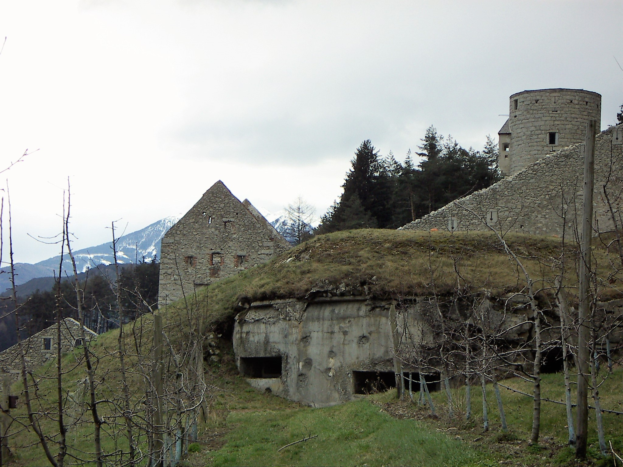 Mühlbacher Klause